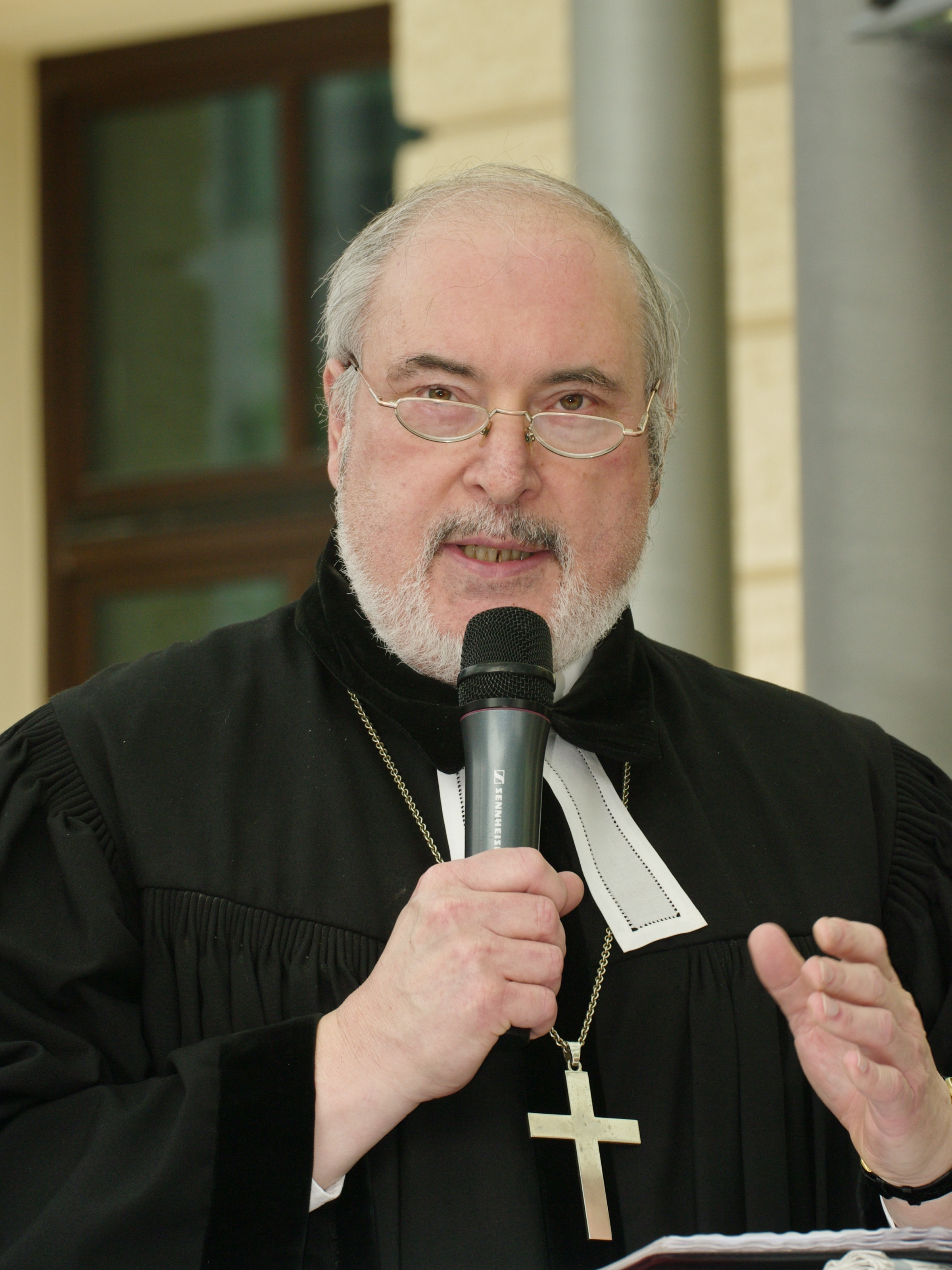 Paul Weiland, evangelischer Superintendent von Niederösterreich, während der Eröffnungsfeier des neuen Hauptbahnhofes in St. Pölten am 10. September 2010